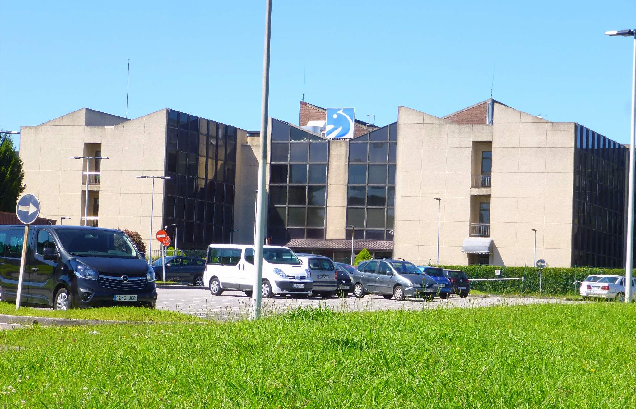 San Sebastián - Parque Científico y Tecnológico de Gipuzkoa - Estudios de EiTB en Miramón